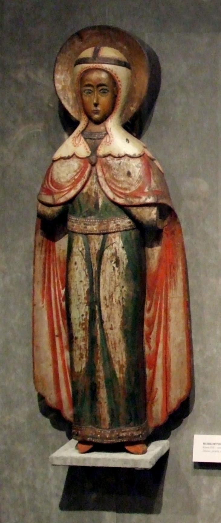 Св. Параскева. К. 17 - нач. 18 в.